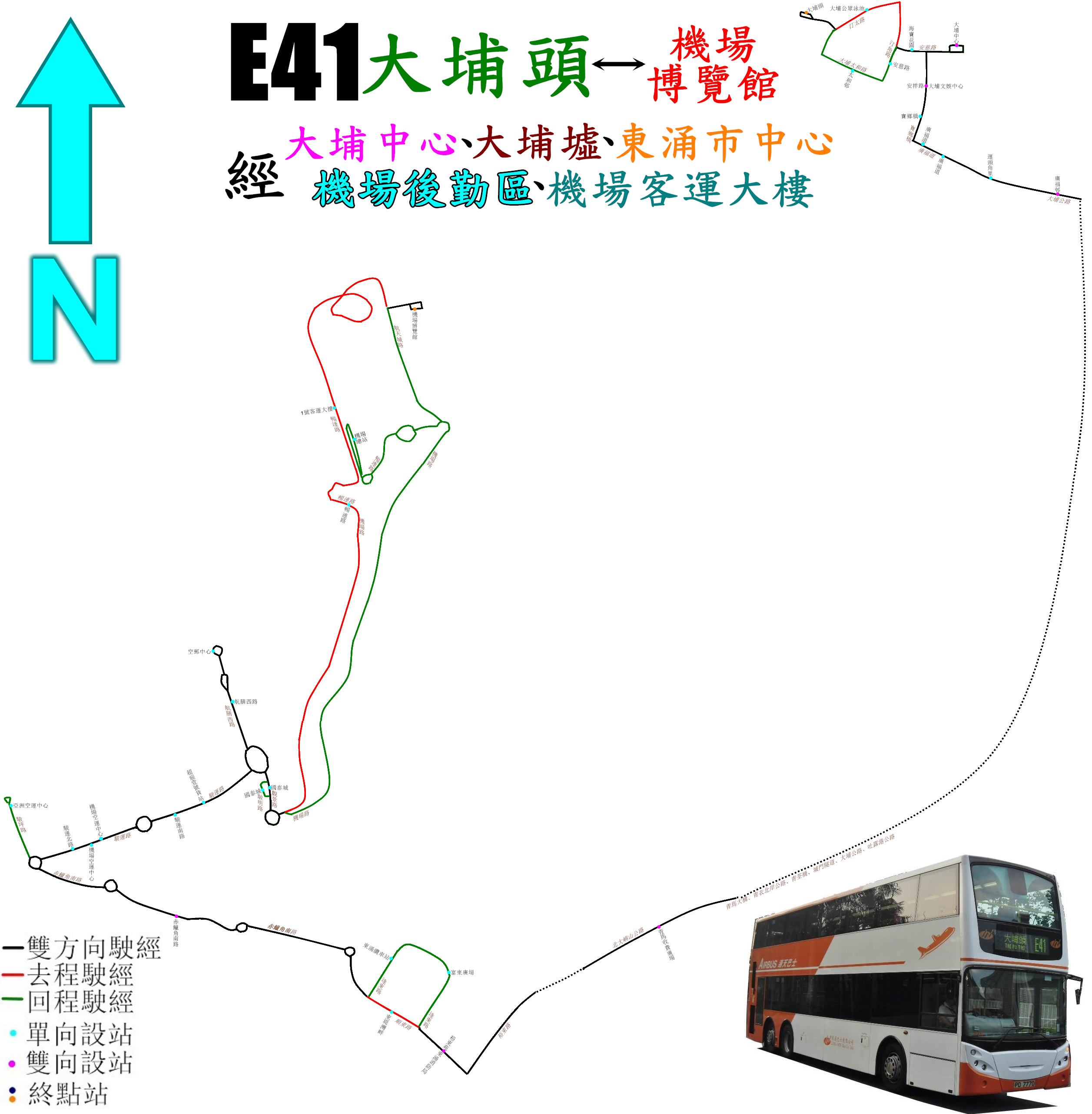 中文（香港）: 龍運巴士E41線的走線圖